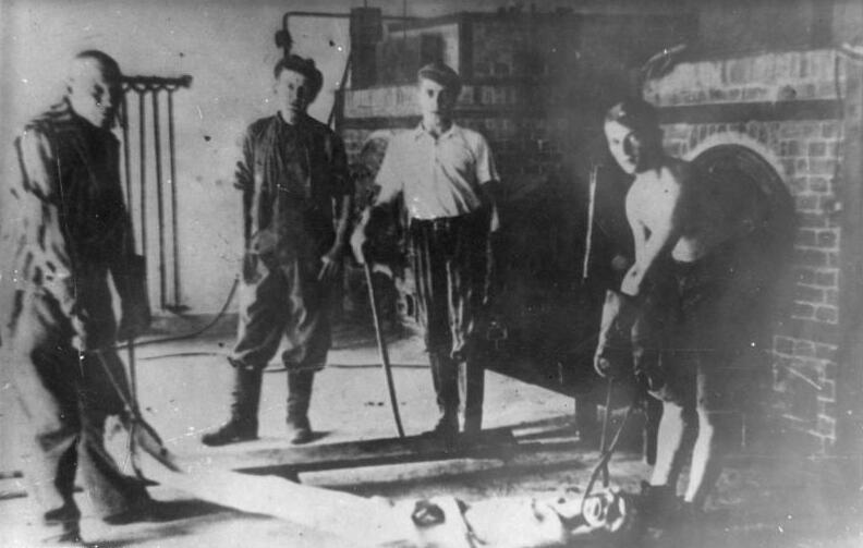 Zentralbild Vernichtungsmethoden der deutschen Faschisten in den Konzentrationslagern. Die Leichen der Häftlinge werden vom Verbrennungskommando mit besonders angefertigten Zangen in Verbrennungsöfen gehoben.